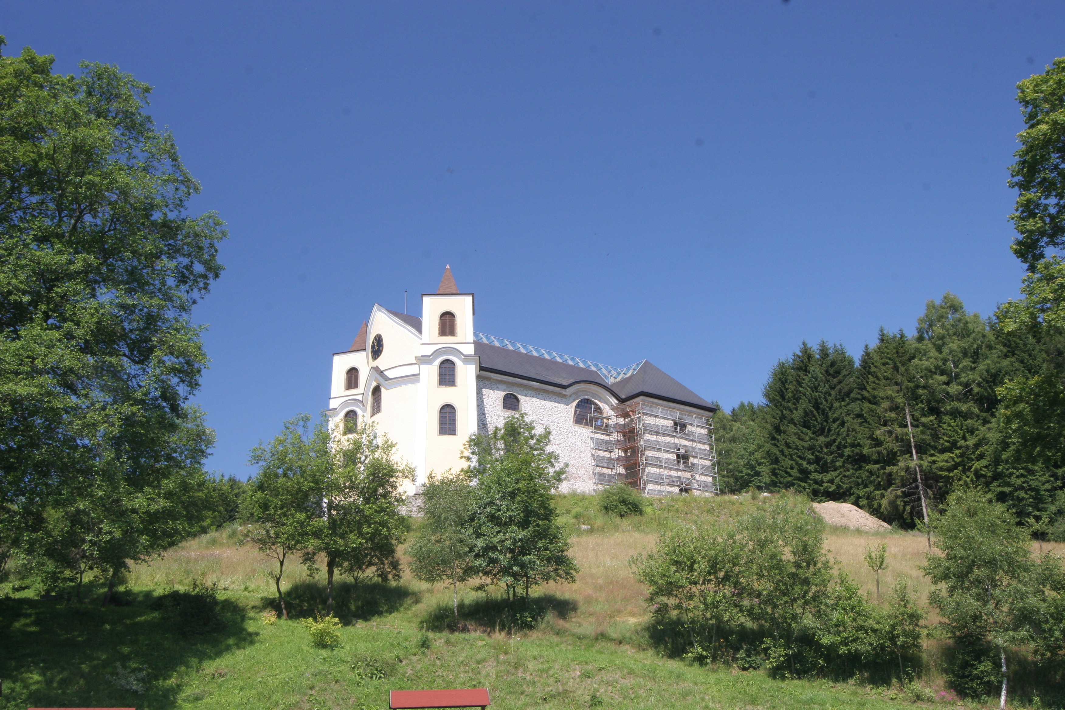 Kostel Nanebevzetí P. Marie, zřícenina (Neratov), Neratov